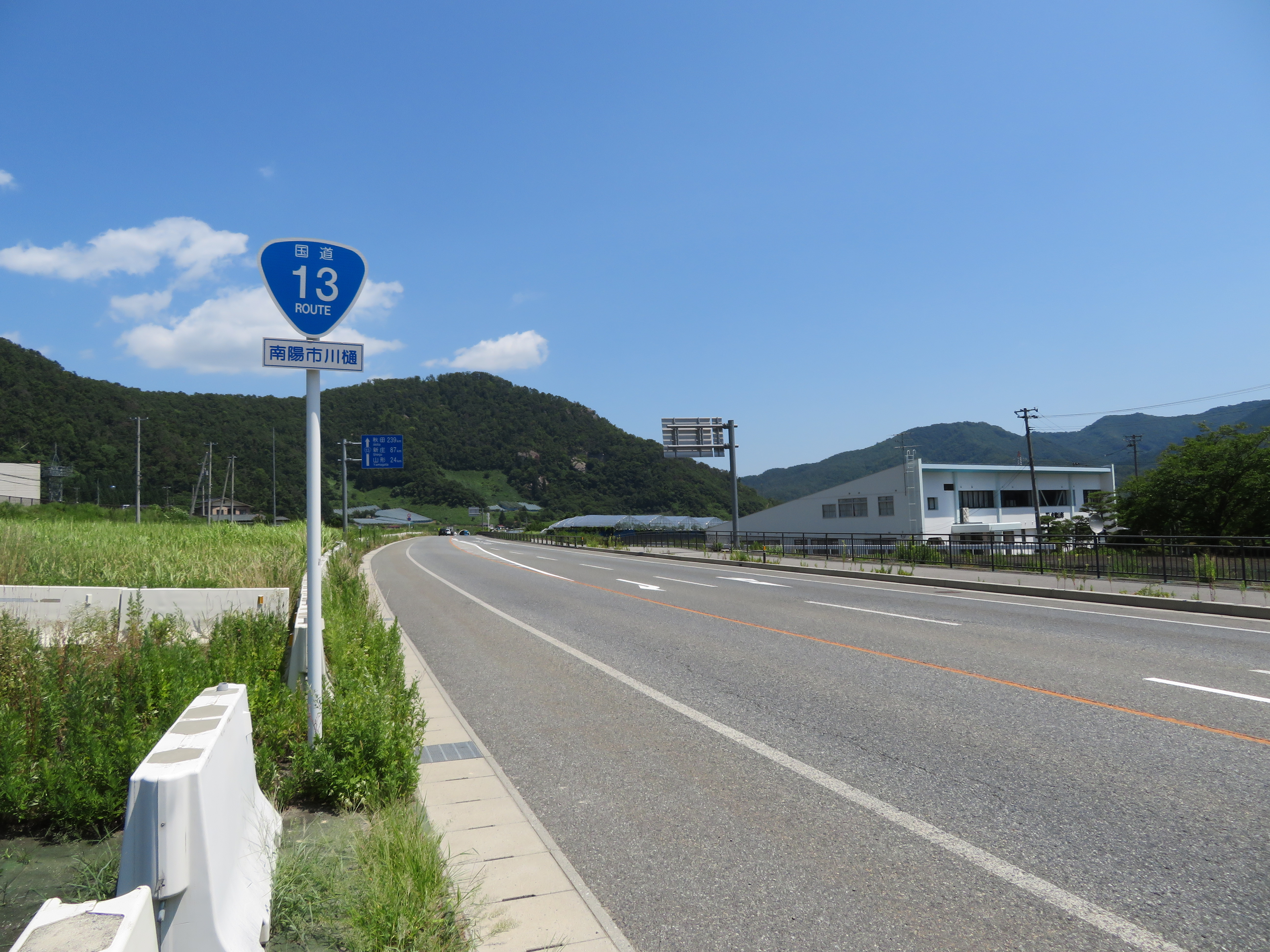 国道13号線上山バイパス山形県南陽市川樋付近（山形市方面を撮影） Canon PowerShot SX720 HS